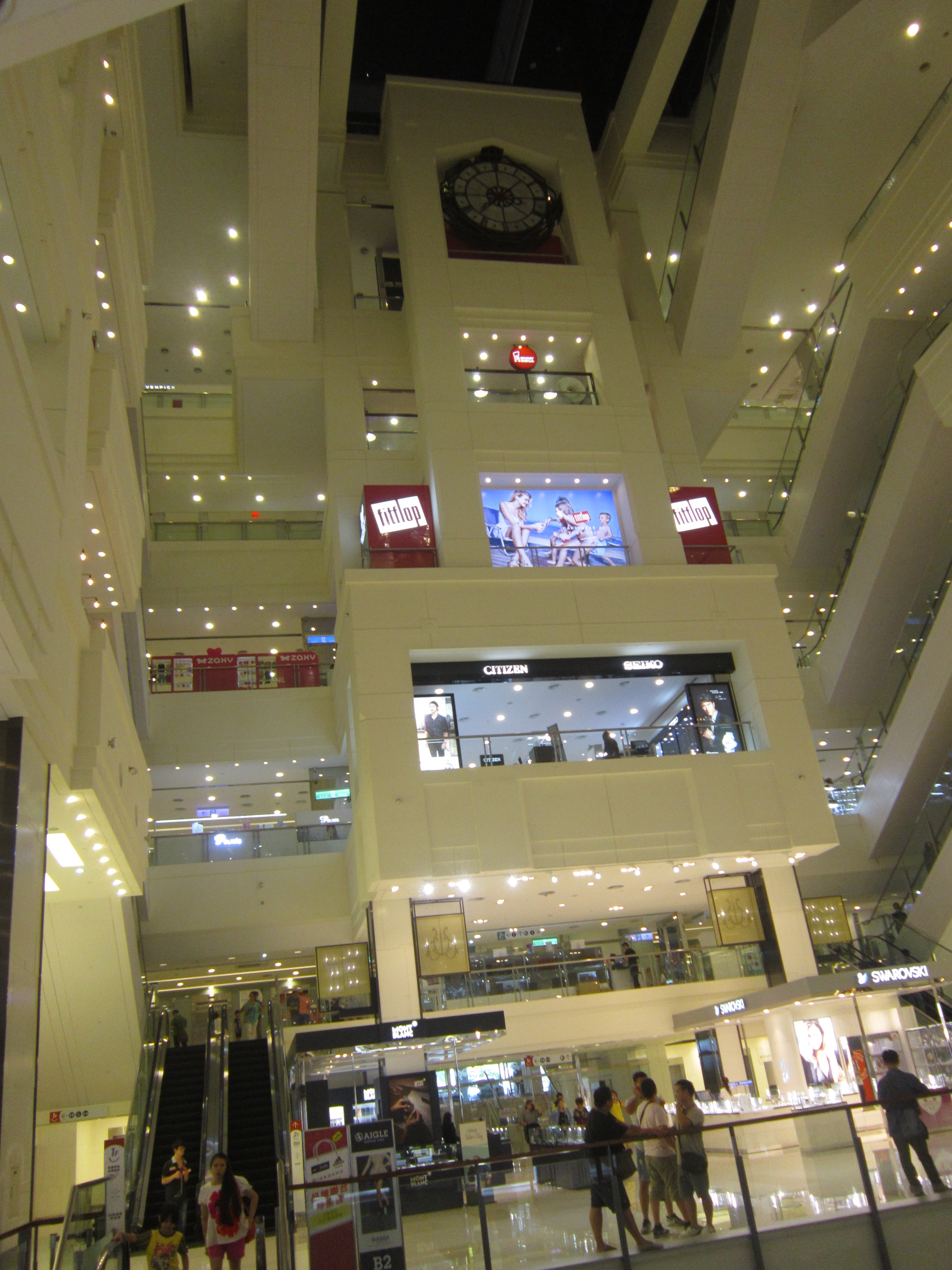 南崁台茂購物中心內的挑空中庭